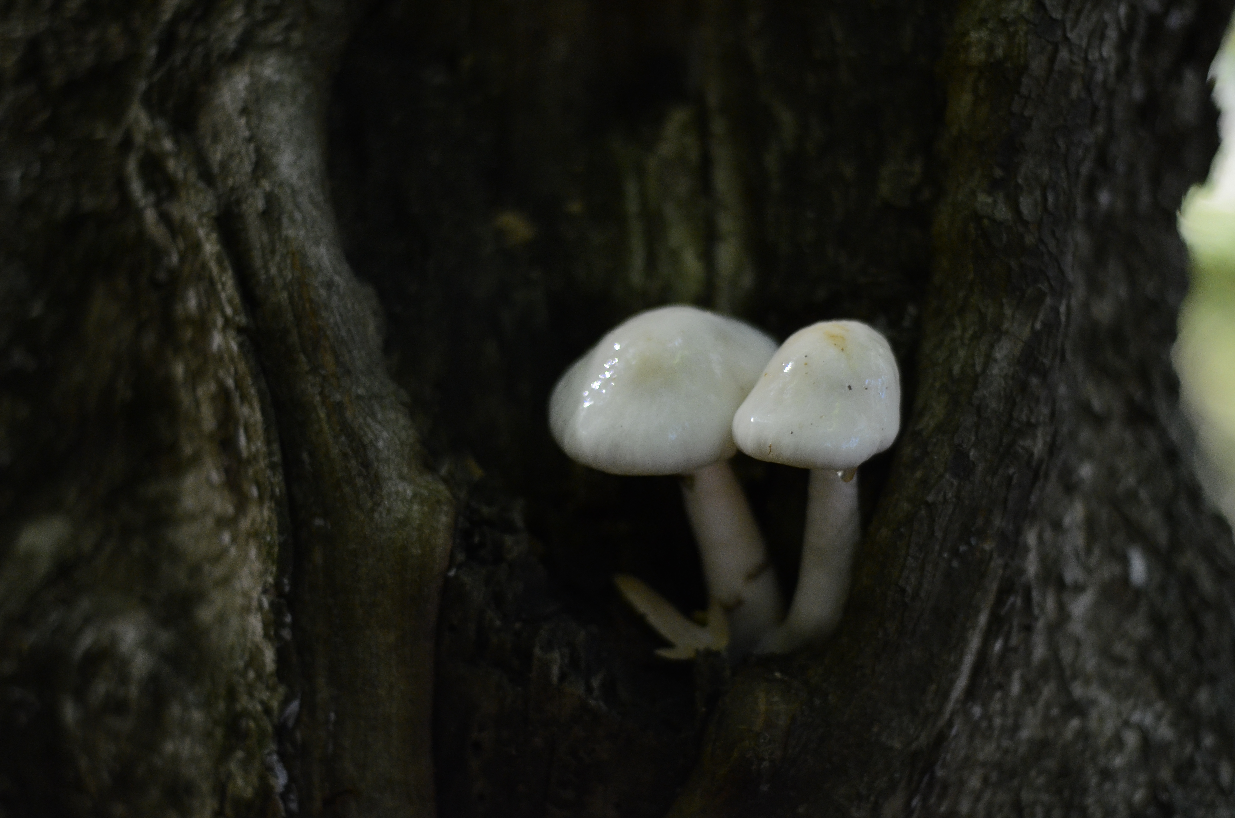 Грибы на Демерджи